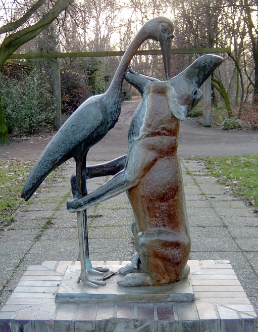 Bildbeschreibung: Bronzeskulptur "Wolf und Storch" von Stephan Horota (1968) Berlin/Germany Standort: Berlin, Treptower Park, zwischen Rosengarten und Spree